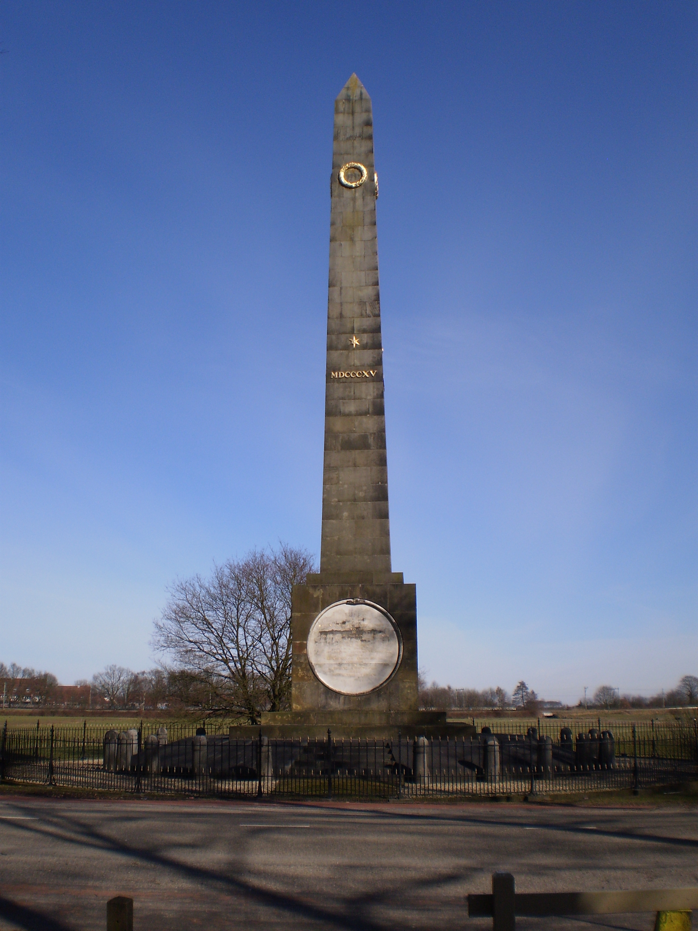 Nille fan Waterloo.